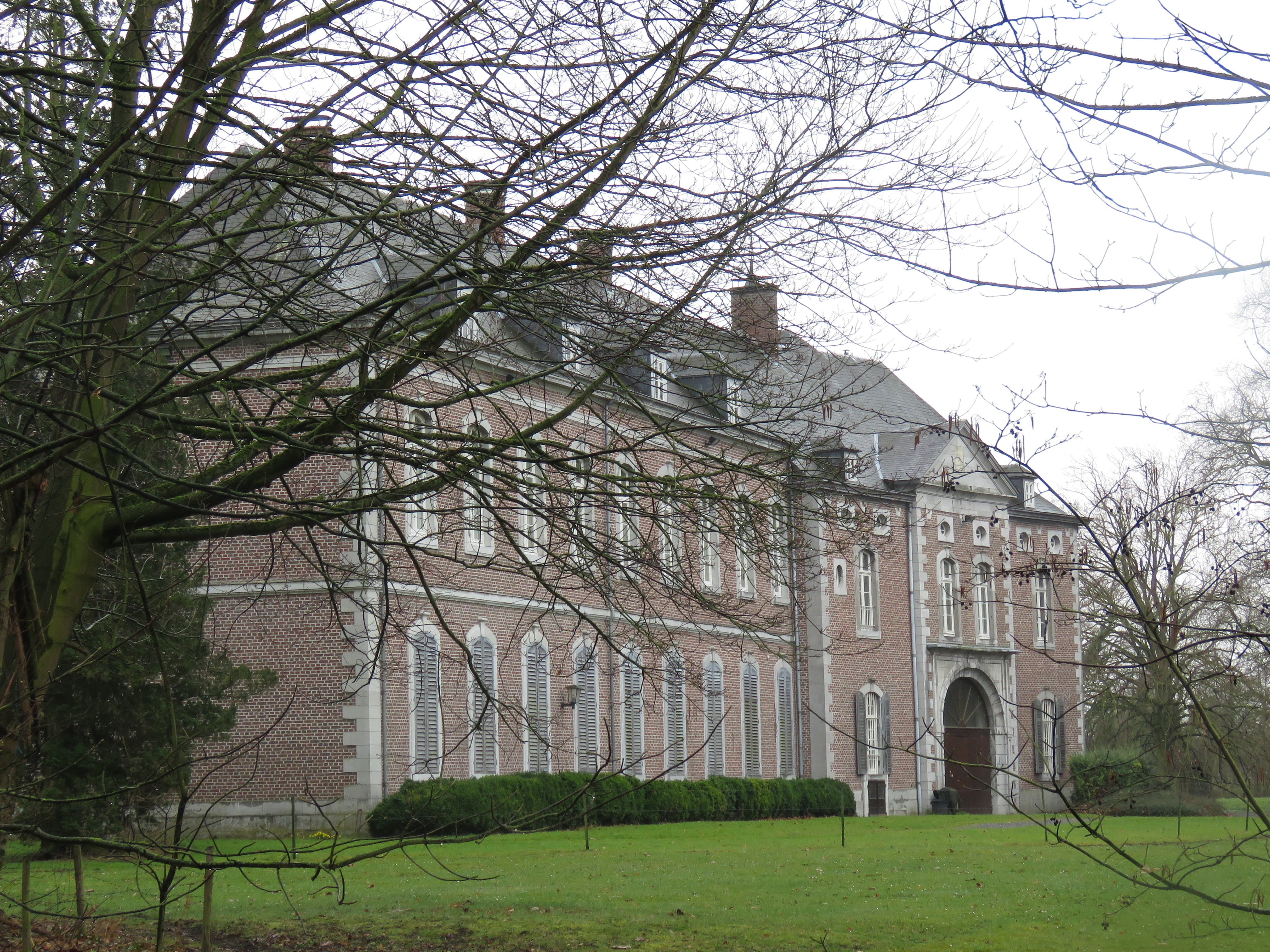 Kasteel Nonnenmielen, een deel van de voormalige abdij